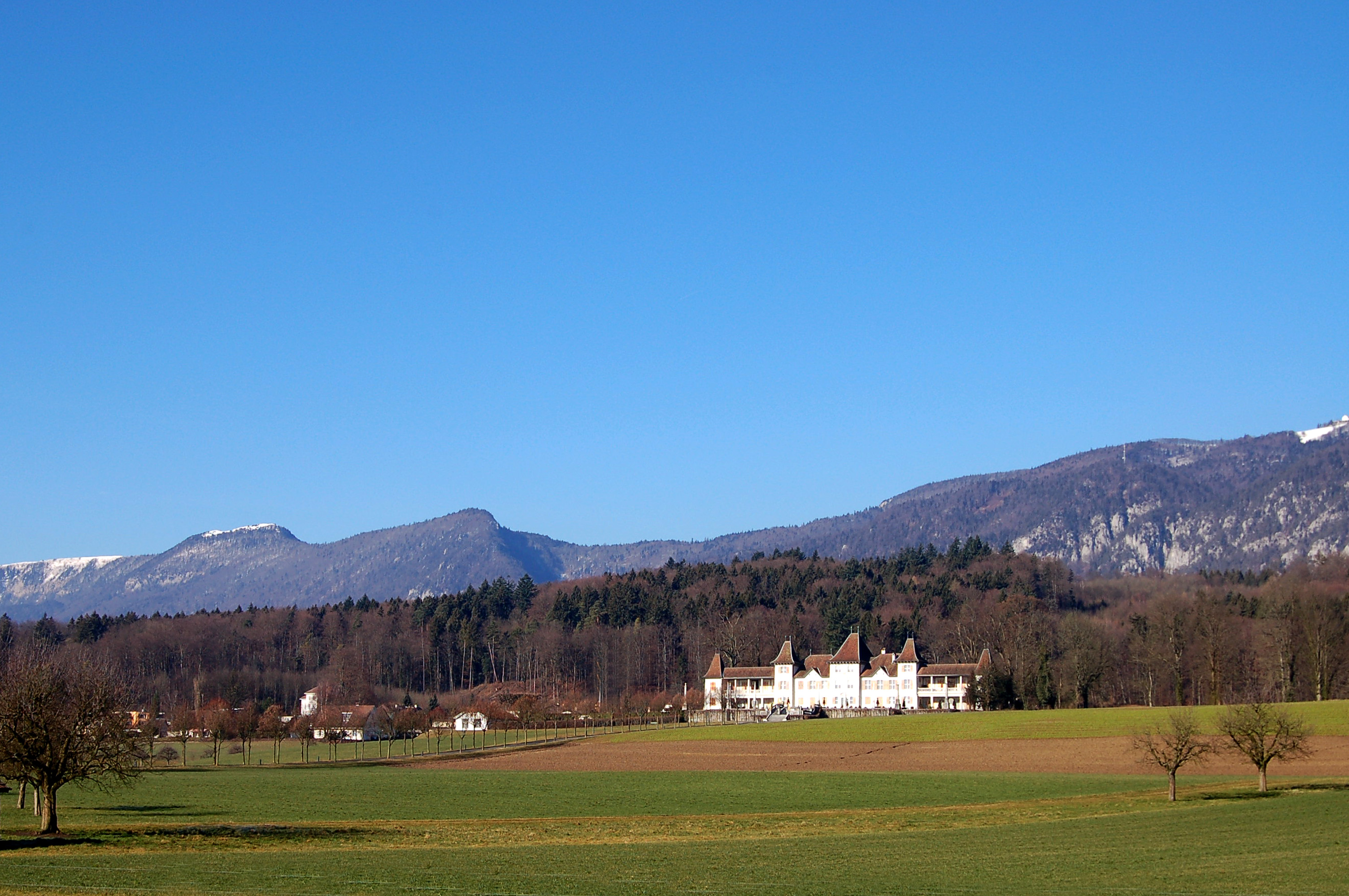 Schloss Waldegg Feldrunnen / St. Niklaus Nordteil